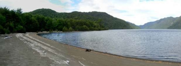 Lago Riesco